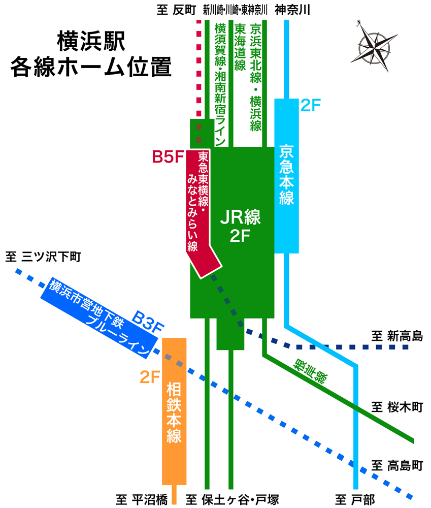 横浜駅各線ホーム位置